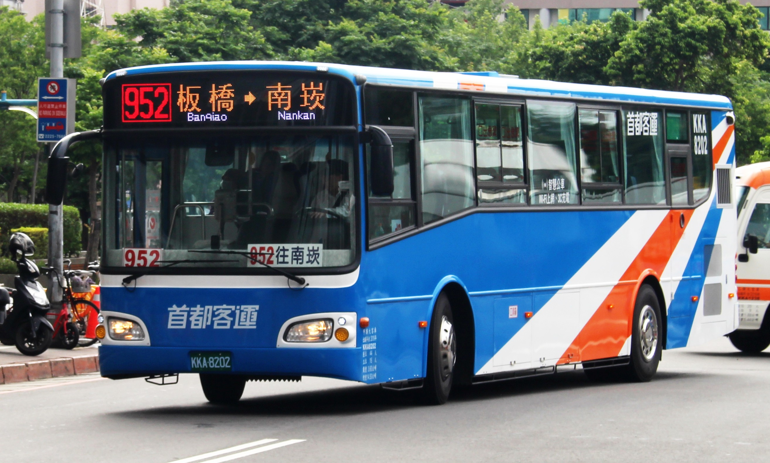 首都客運 HINO RK8JRVA KKA-8202 952